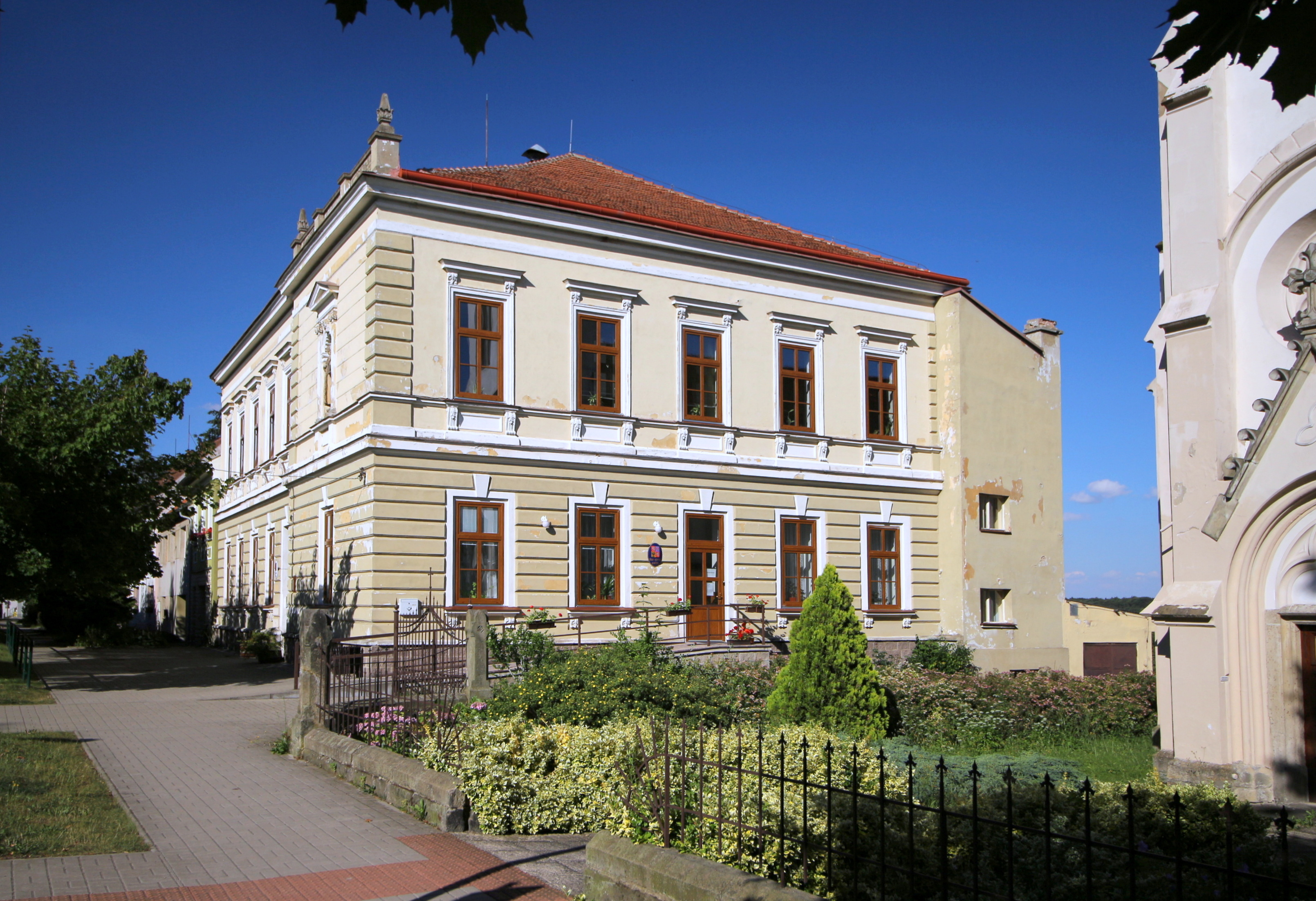 Horní Ročov - škola, úřad městyste